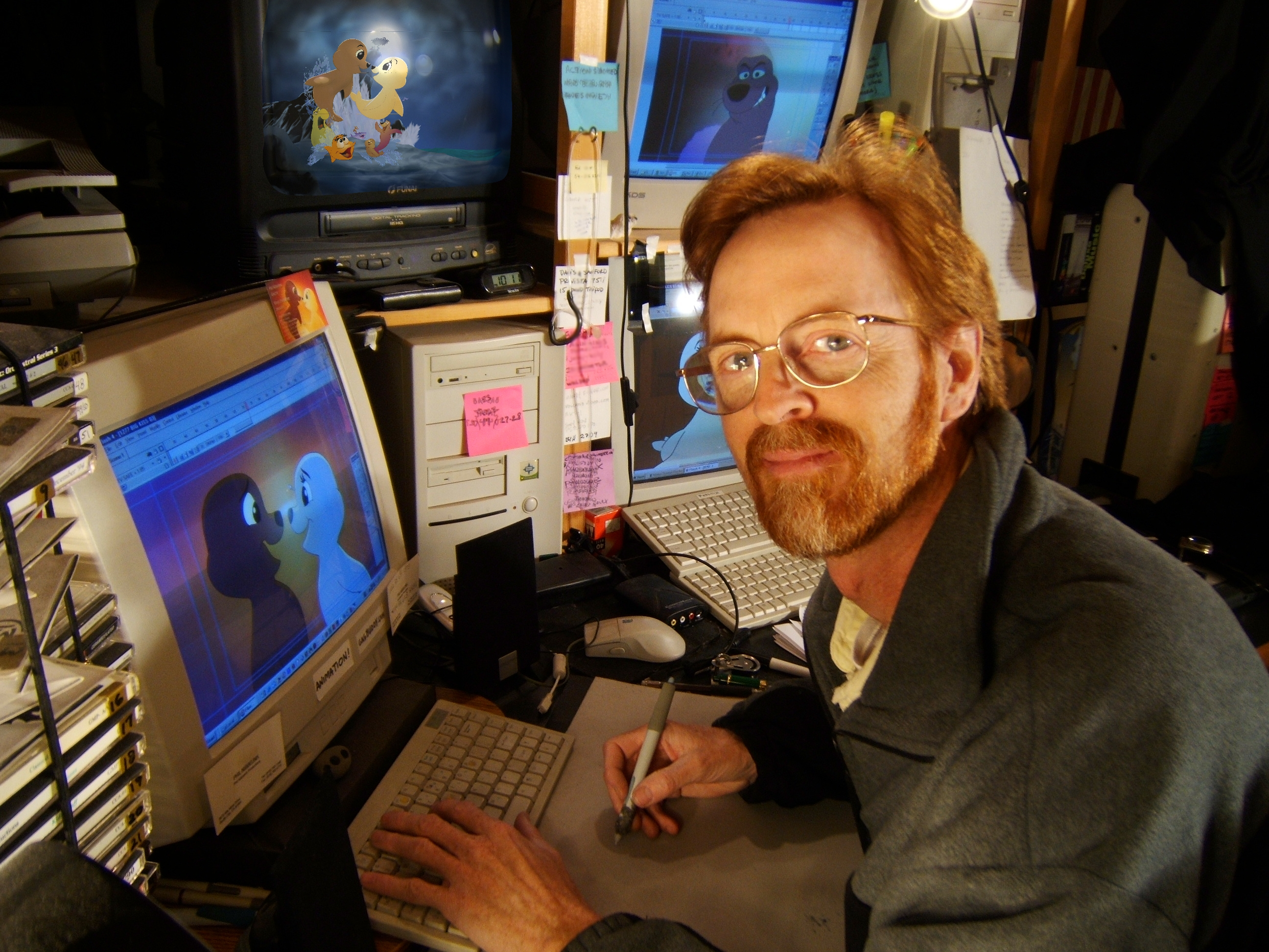 Le réalisateur et animateur Phil Nibbelink, travaillant sur son film Romeo & Juliet: Sealed with a Kiss (2005)